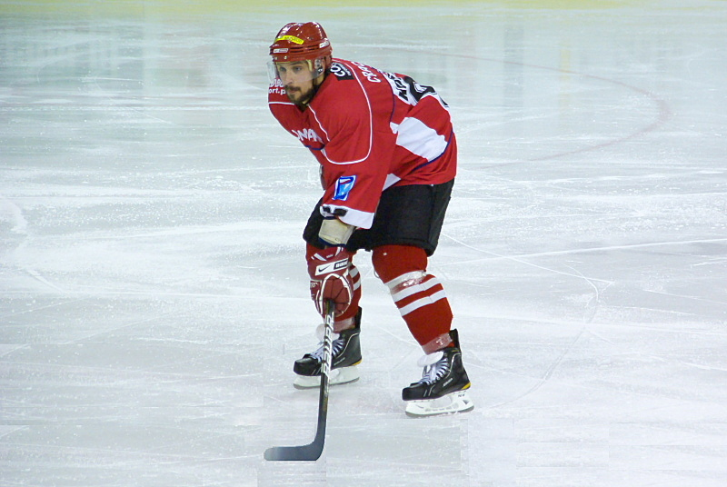 David Kostuch podczas meczu Ciarko PBS Bank Sanok - ComArch Cracovia 7 marca 2012